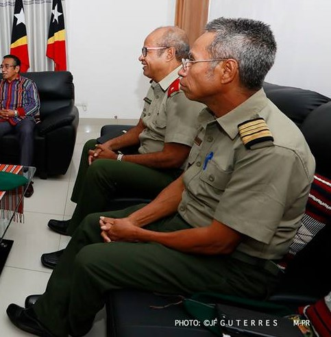 Brigadier-General Falur Rate Laek (hinten) und Colonel António Soares da Silva. Im Hintergrund Präsident Francisco Guterres